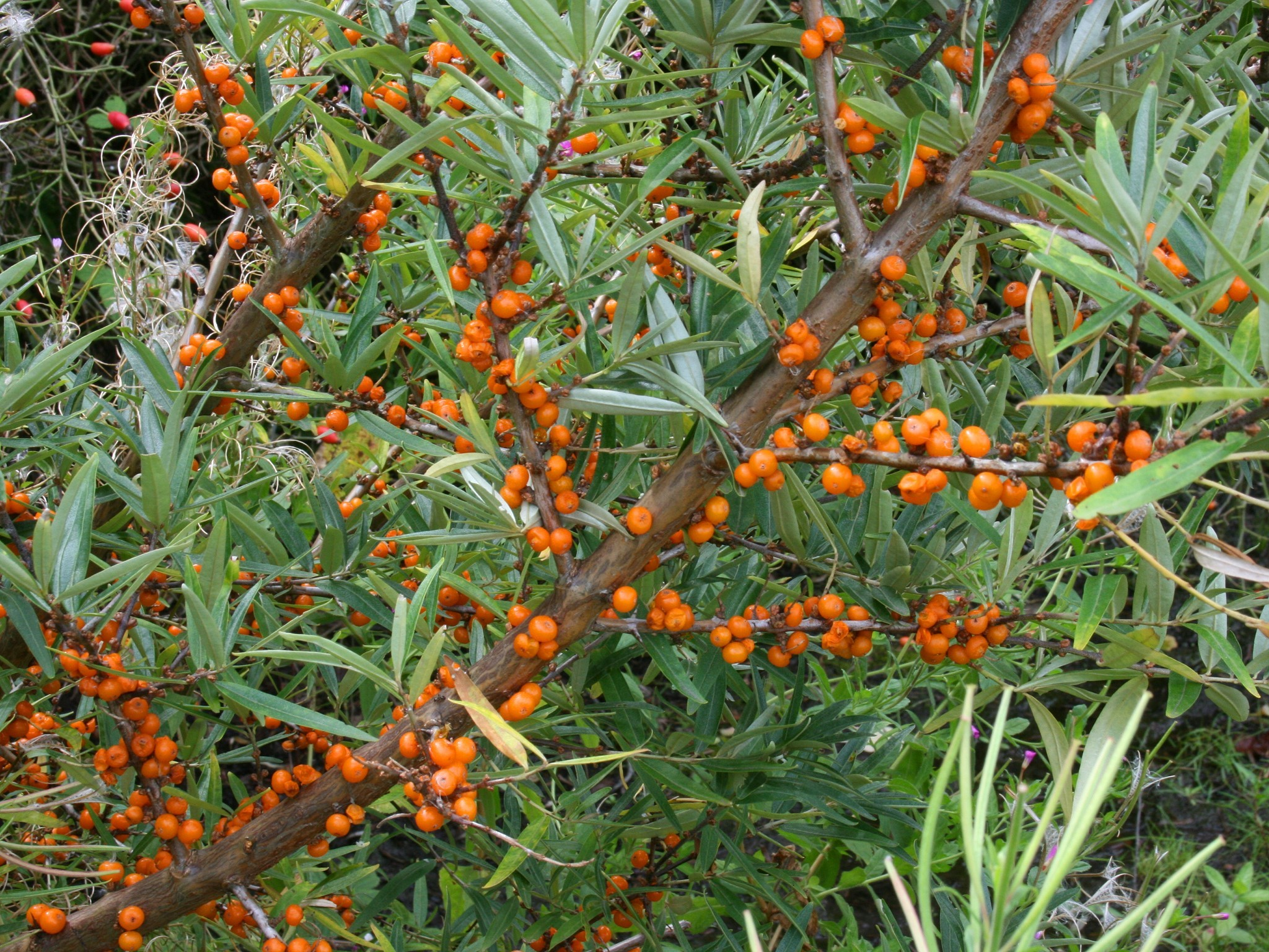 Schurenbachhalde in Essen